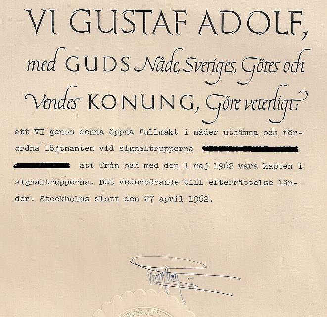 Exempel på officersfullmakt från 1962.